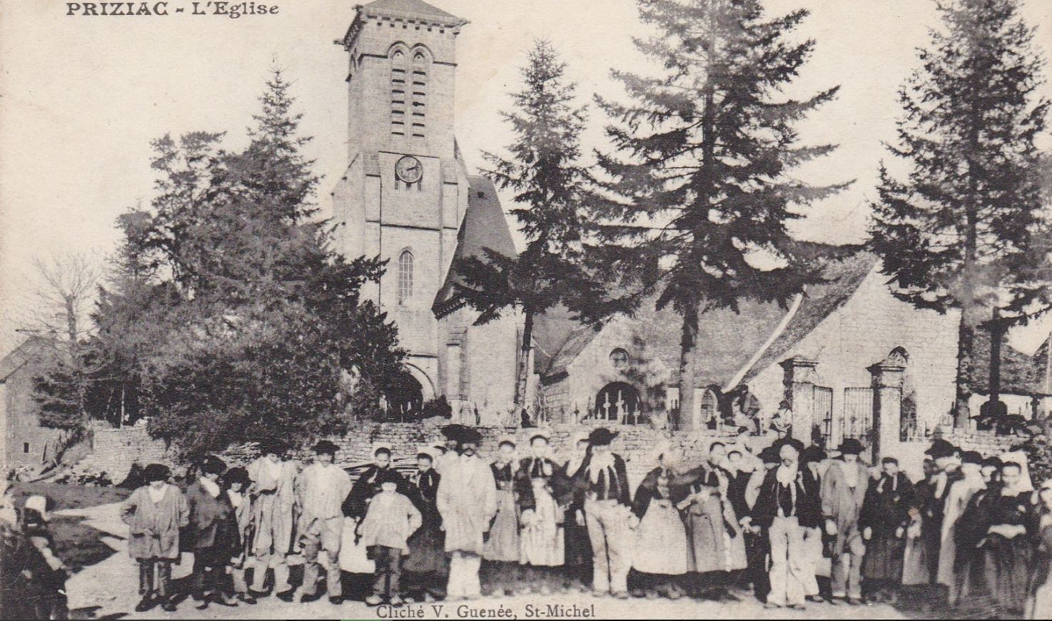 L'église de Priziac vers 1900 avec devant la foule des paroissiens qui posent pour la photo (carte postale ancienne).